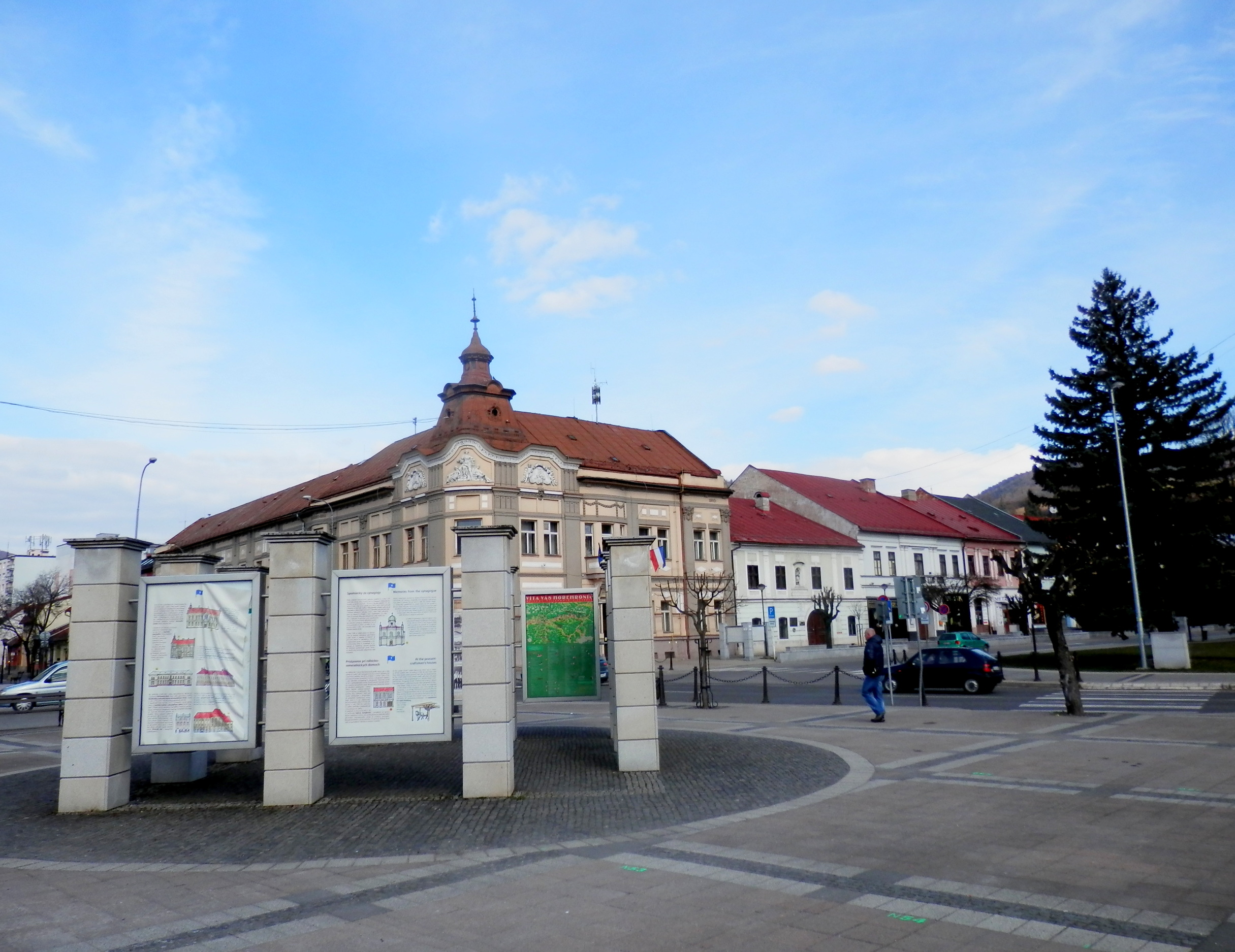 Štefánikovo námestie, mesto Brezno.